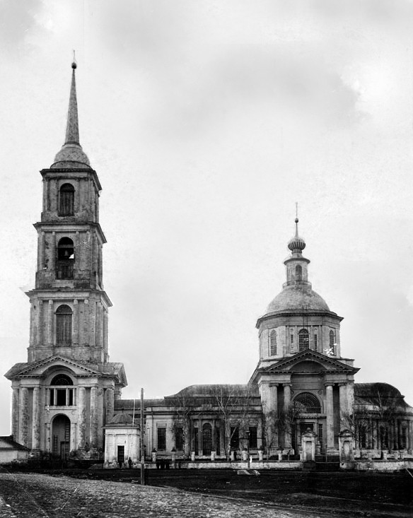 Никольский собор с колокольней